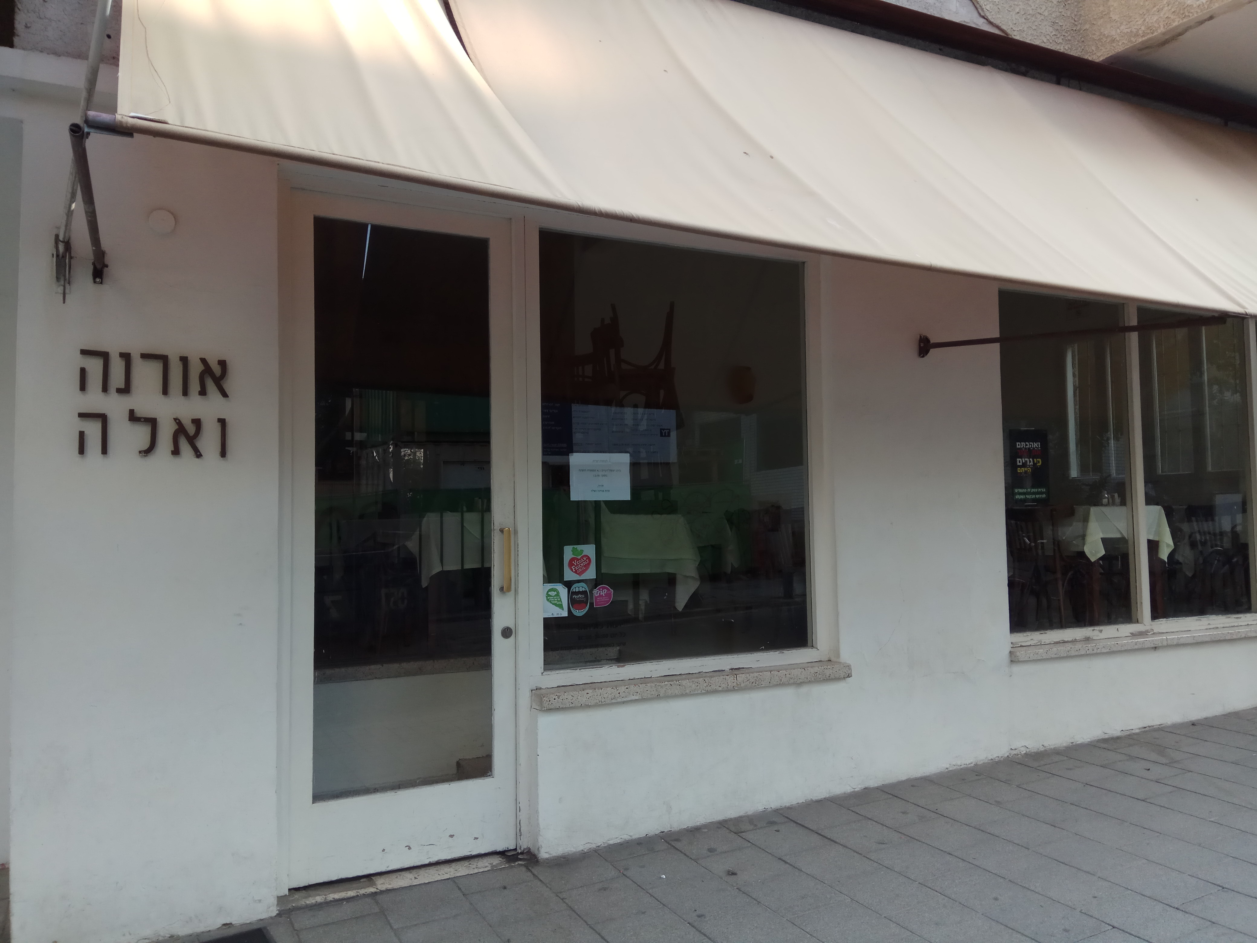 מסעדה אורנה ואלה ברח' שינקין 33 בתל אביב